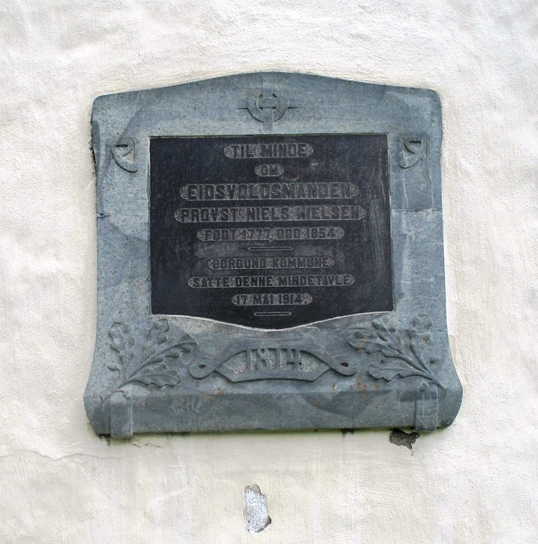 Minnesmerke over eidsvollsmannen Niels Nielsen (eller Nicolai Nielsen) på veggen av Borgund kirke i Ålesund